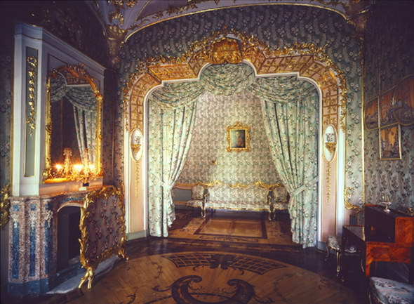 КИТАЙСКИЙ ДВОРЕЦ. ШТОФНАЯ ОПОЧИВАЛЬНЯ